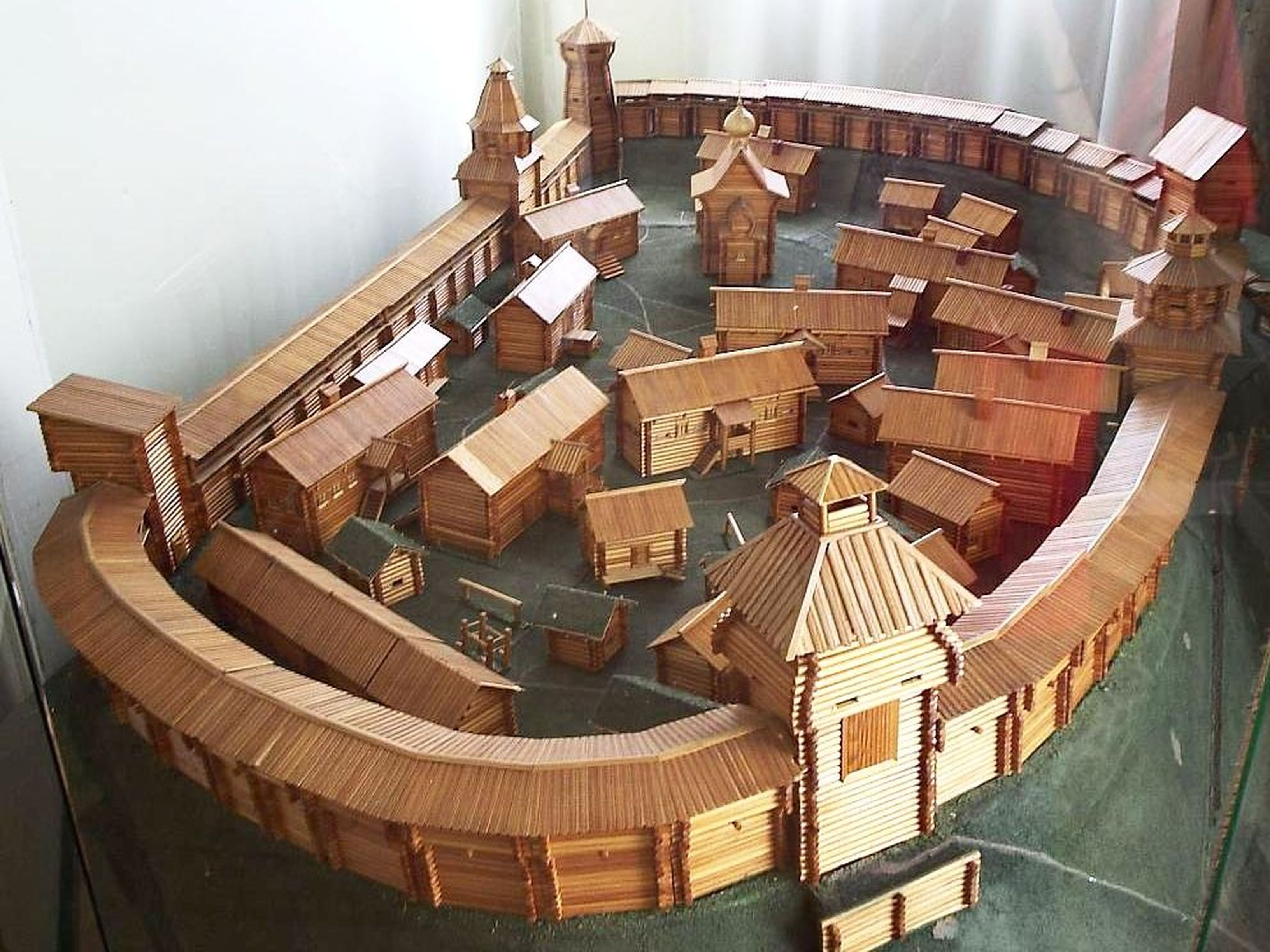 макет Чердынского кремля в Чердынском краеведческом музее